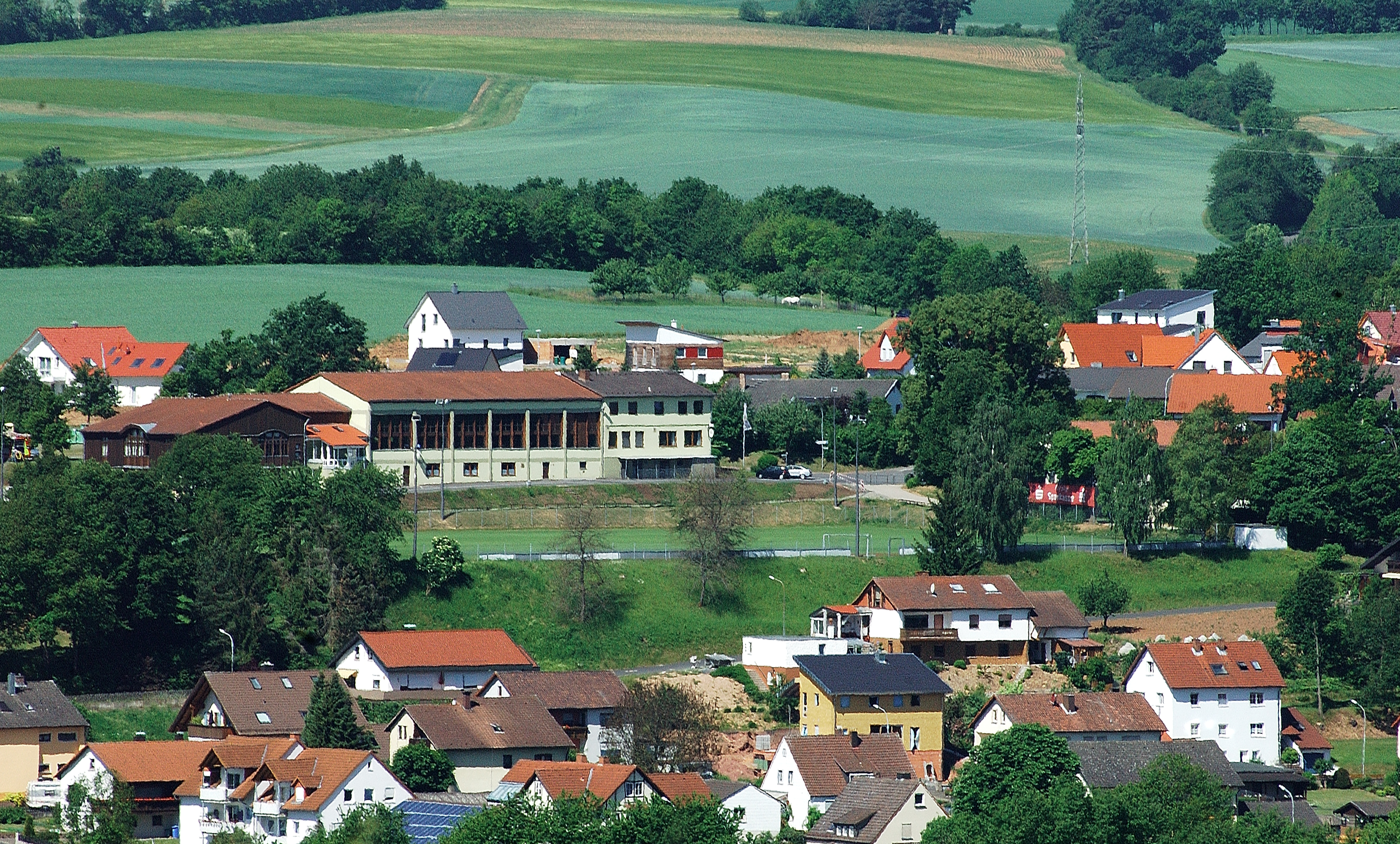 Rudi Erhard Halle